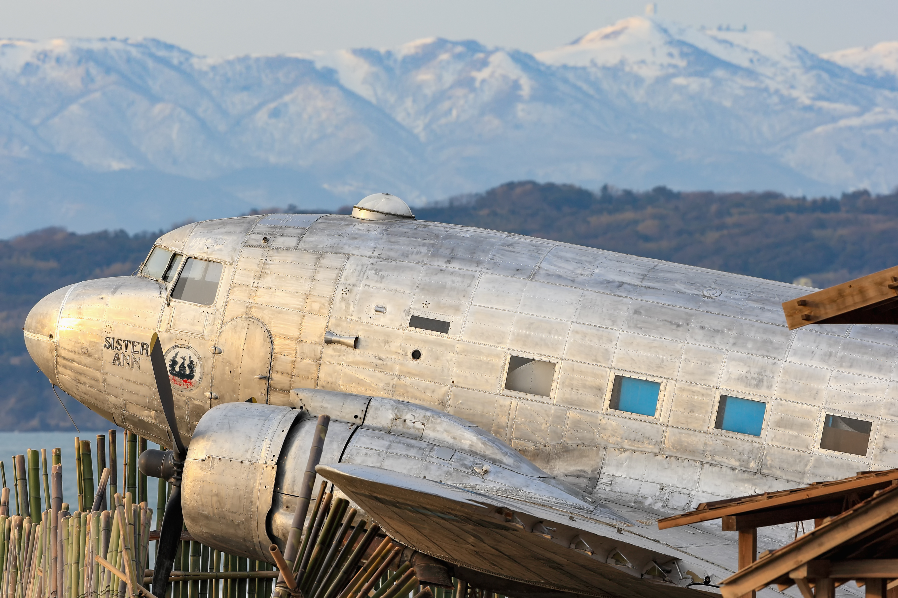 映画「飛べ!ダコタ」撮影のために、新潟県佐渡市（旧羽茂町）佐渡市小木堂釜の素浜海岸に置かれた、元USAF DOUGLAS AC-47D C-47B-1-DK 43-48501 同映画のモデルになったイギリス空軍 DOUGLAS DC-3 C-47A-50DL “SISTER ANN” C/N10028 FL510のレプリカ塗装になっている。奥に見える冠雪した山々は大佐渡山地